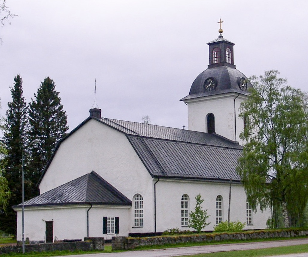 Nås kyrka i dalarna